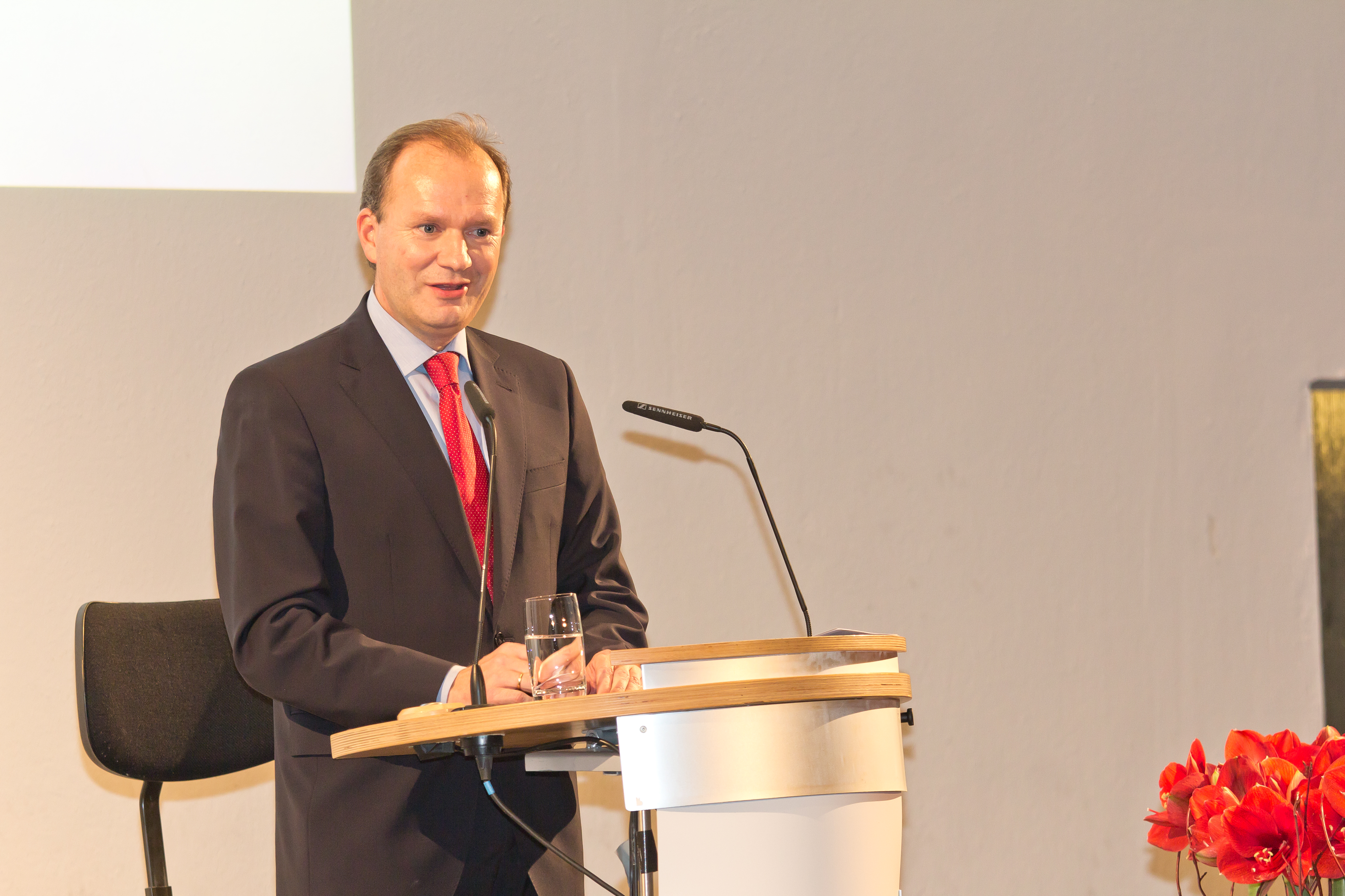 Verleihung des Rheinischen Kulturpreises der Sparkassen-Kulturstiftung Rheinland in der Piazetta des historischen Rathauses von Köln an Alexandra Kassen. Rede von Michael Breuer, Präsident des Rheinischen Sparkassen- und Giroverbandes Düsseldorf